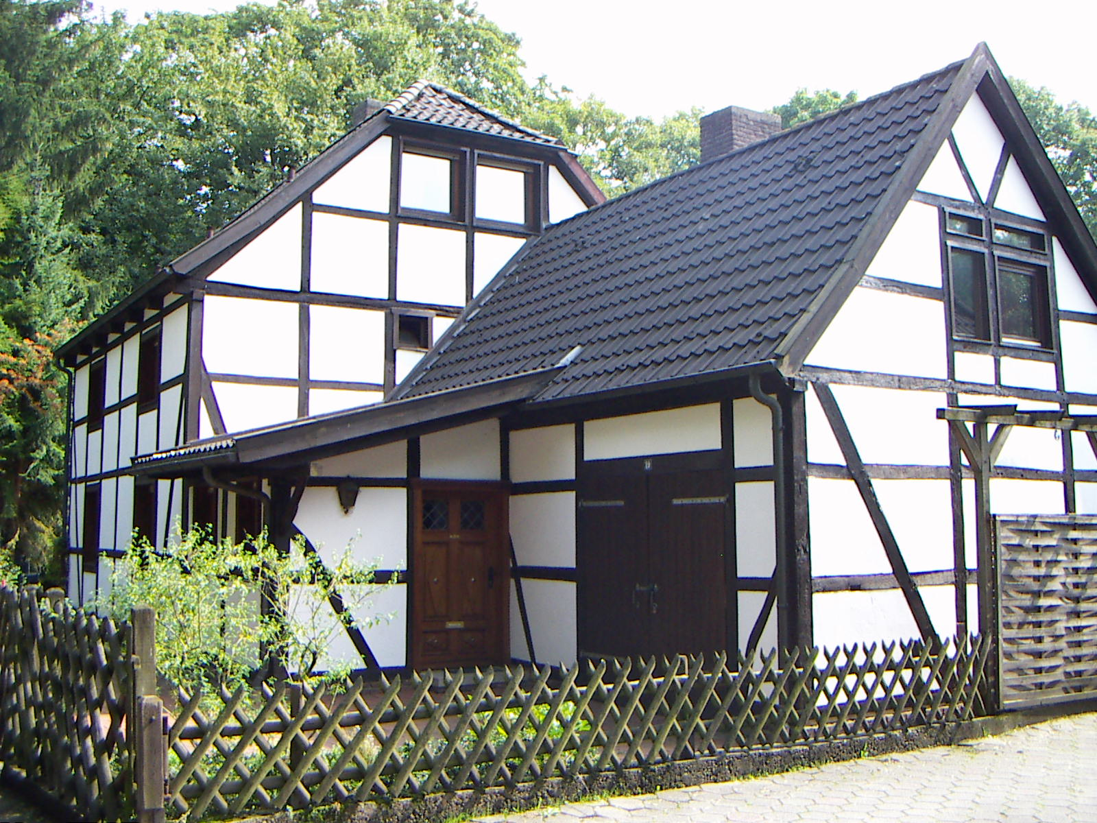 Wirtschafts- und Wohngebäude am ehemaligen Lehngut Haus Brockhausen (18. Jhdt.) in Unna-Königsborn